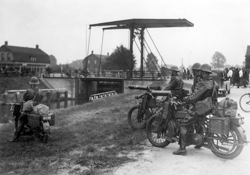 De motorbrigade met mitrailleurs belet tijdens grote legermanoeuvres in Noord-Brabant de vijand het kanaal over te steken (de brug wordt beschouwd als te zijn opgeblazen), 19 september 1936. Gebouw op de achtergrond betreft hotel, café en restaurant van Willy den Ouden, bij Sluis 4 te Veghel.